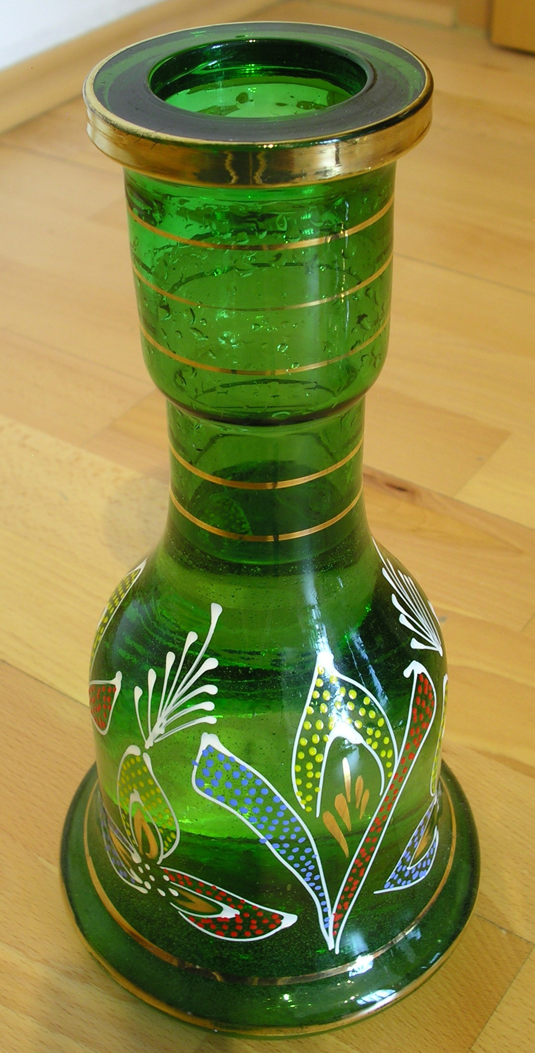 Karafa vodní dýmky ze zeleného skla.